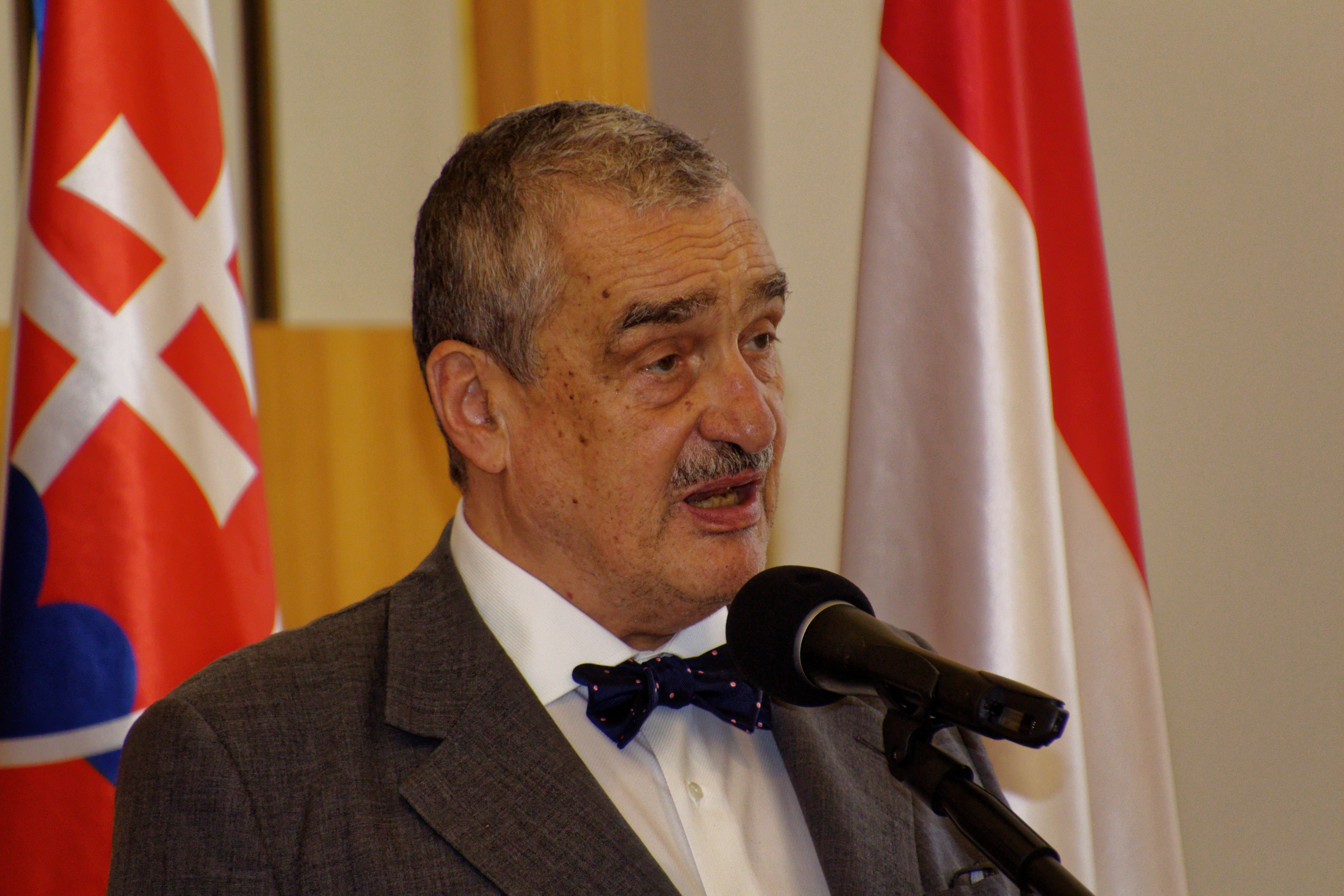 Karel Fürst Schwarzenberg bei der Laudatio zur Verleihung des Adalbert-Preises an Hanna Suchocka in Bratislava